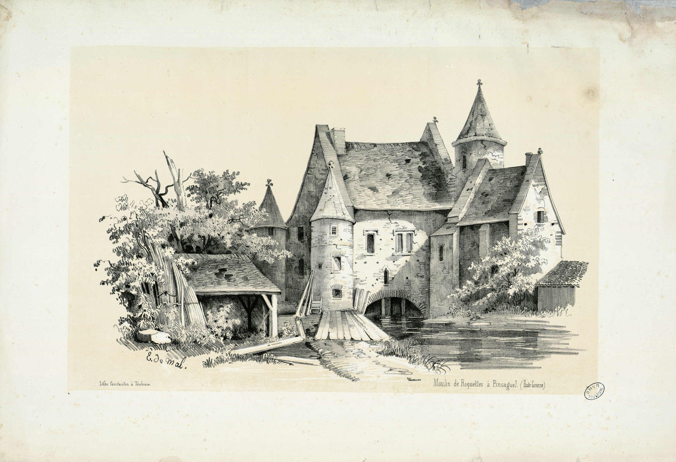 Fait partie d'un recueil de 23 planches lithographiées en camaïeu Ancely, René (1876 - 1966). Possesseur